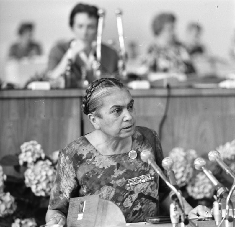 Zentralbild/Gahlbeck, 27.6.1964 Frauenkongress der DDR Dynamo-Sporthalle Berlin - 2. Tag (26.6.1964) Frau Dr. Hilde Benjamin, Minister für Justiz der DDR, sprach zur Diskussion.